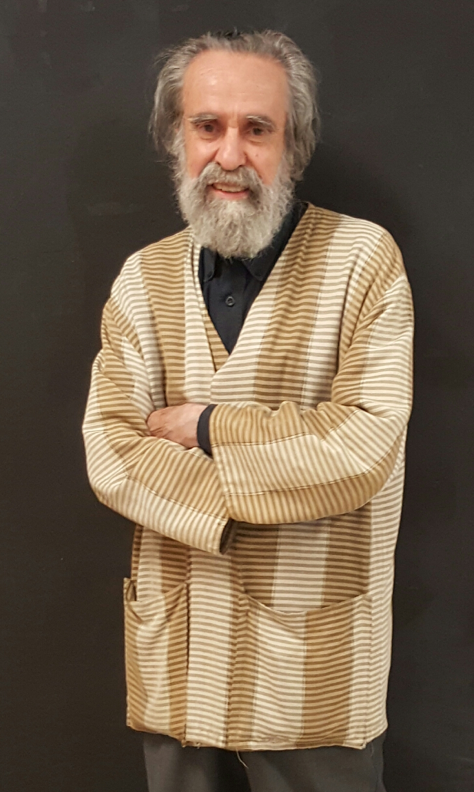 Isidoro Valcárcel Medina en la Facultad de Bellas Artes, en marco del II Congreso de Jóvenes investigadores 2017